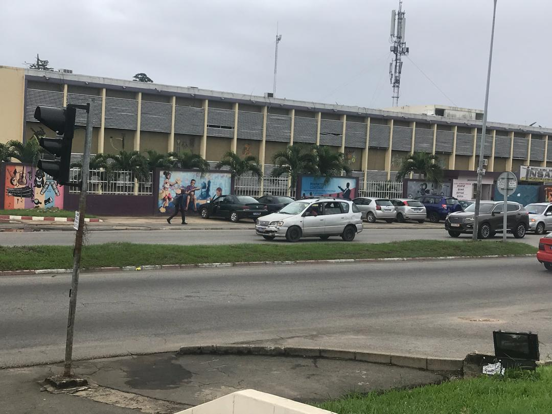 Le bâtiment de l'INSAAC vu de l'extérieur